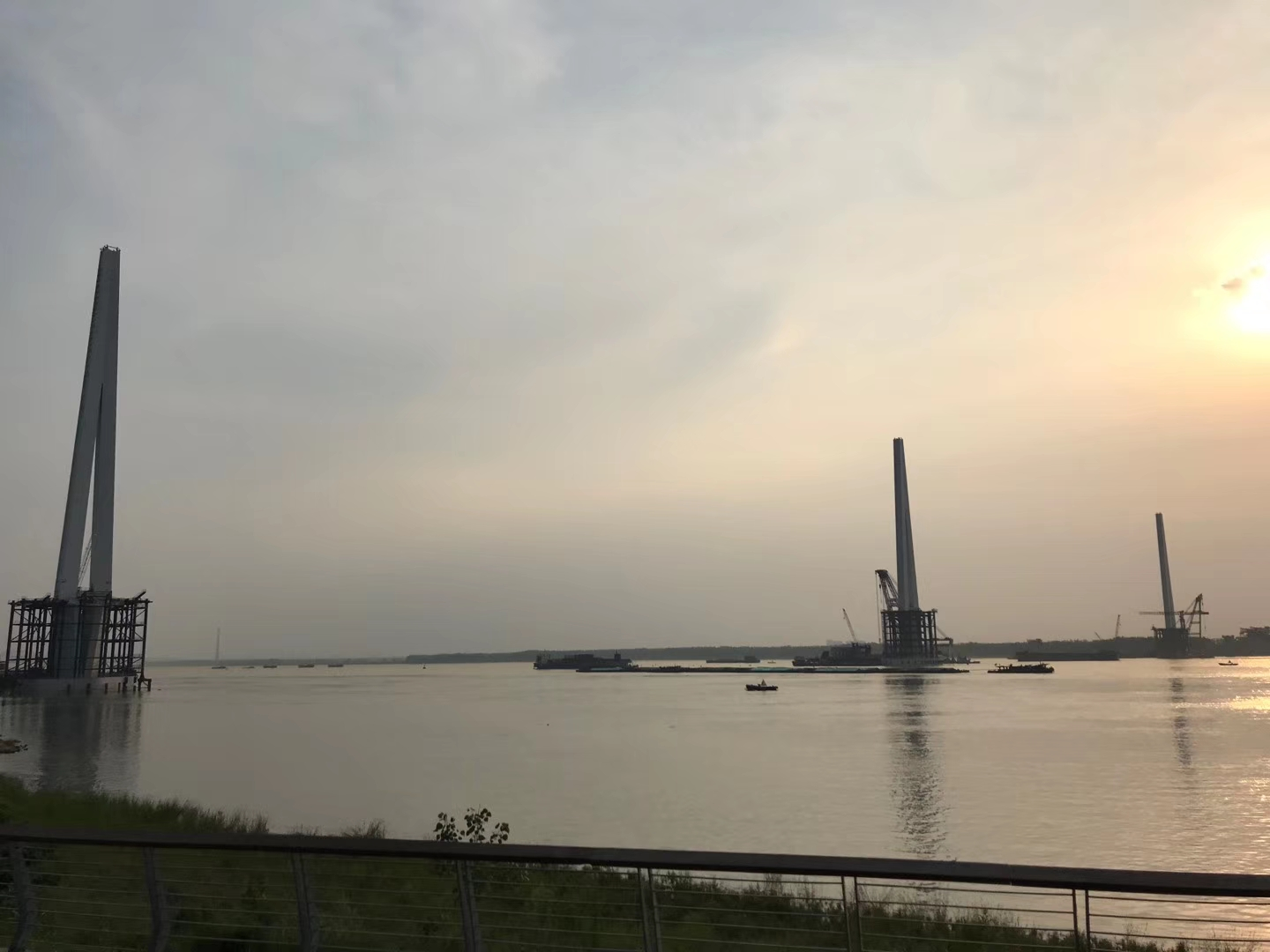 建设中的南京长江第五大桥